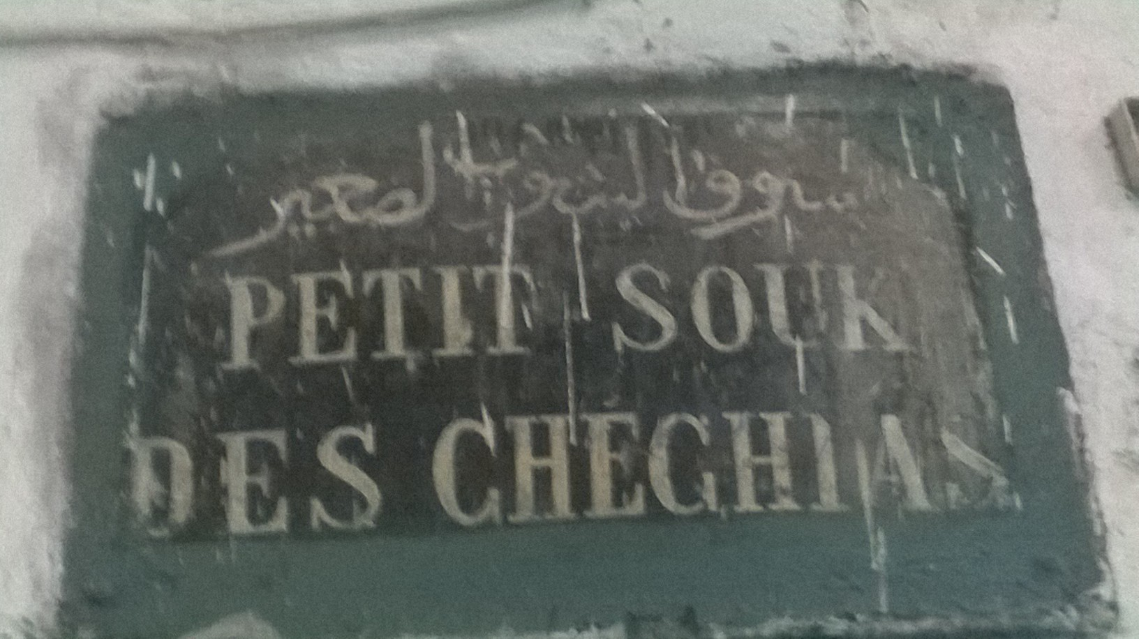 la médina de Tunis